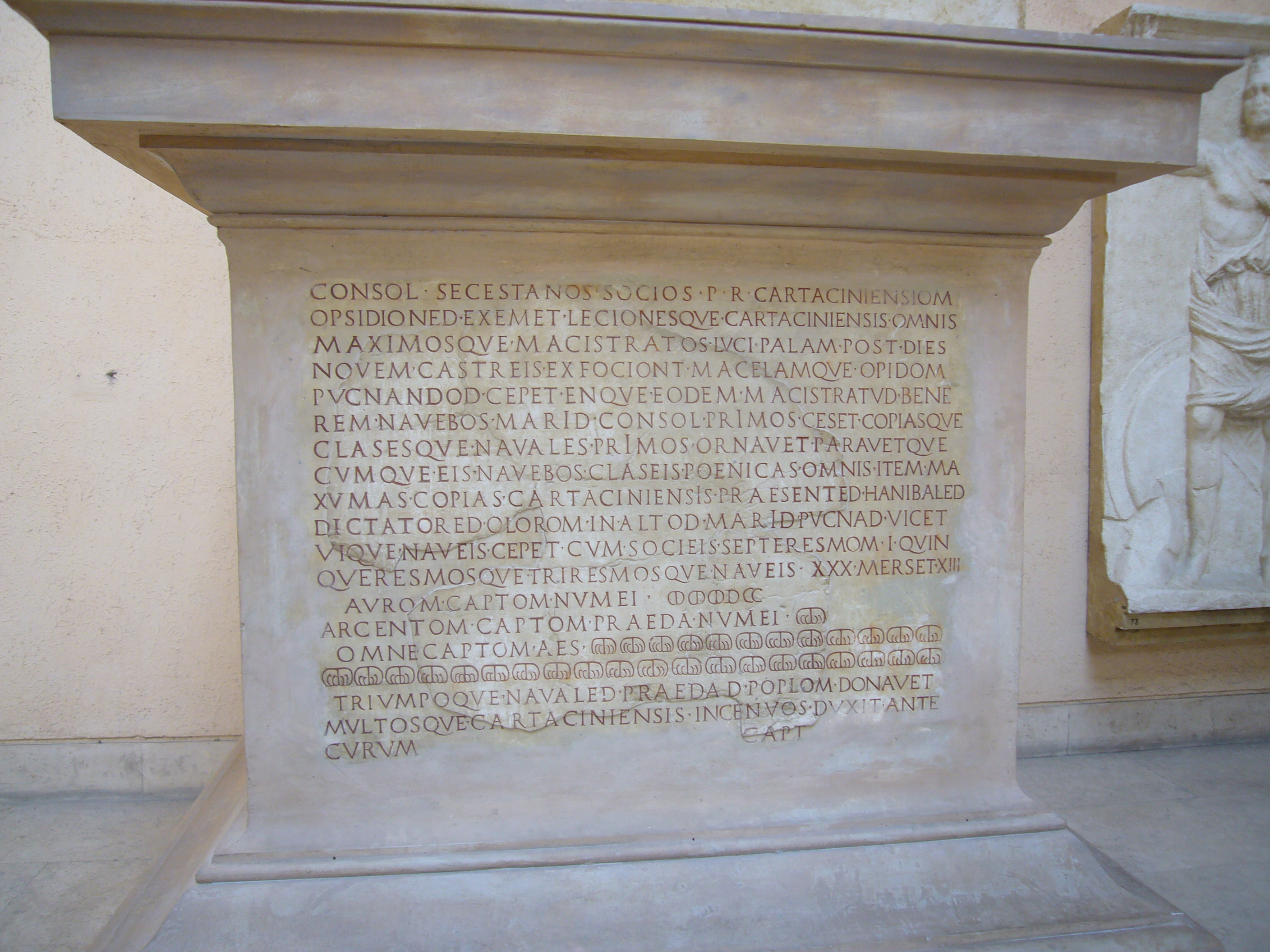 Roma Museo della civiltà romana: riproduzione della base della colonna rostrata di Caio Duilio